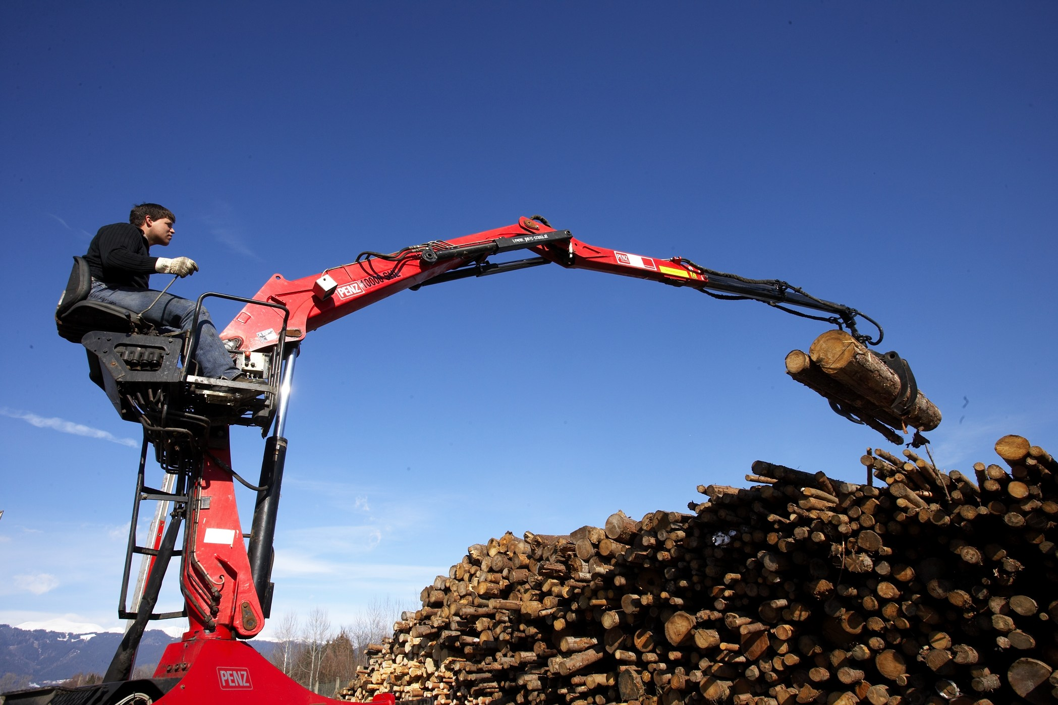 Holzladekran in Z-Form